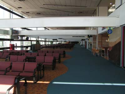 Interior Terminal Nacional del Aeropuerto de Santiago. Interior aeropuerto SCL Santiago.